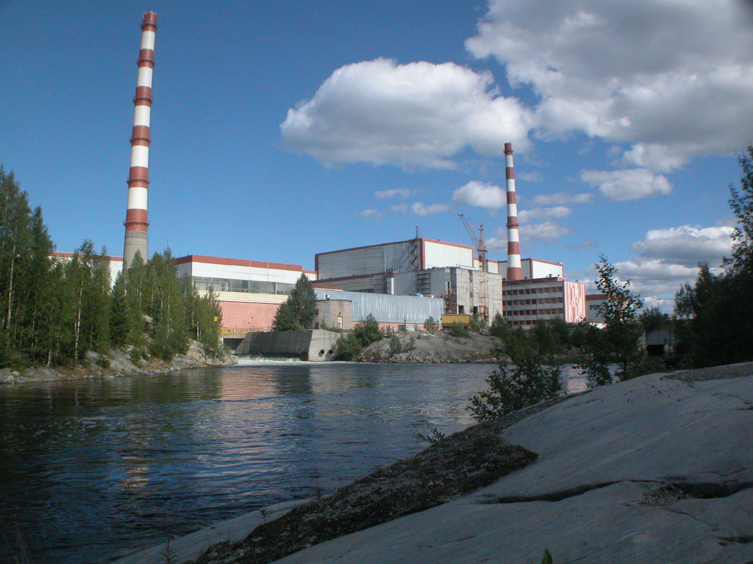 Россия. Мурманская область. Полярные Зори. Концерн Атомпром. Кольская АЭС. Вид со сбросного канала.